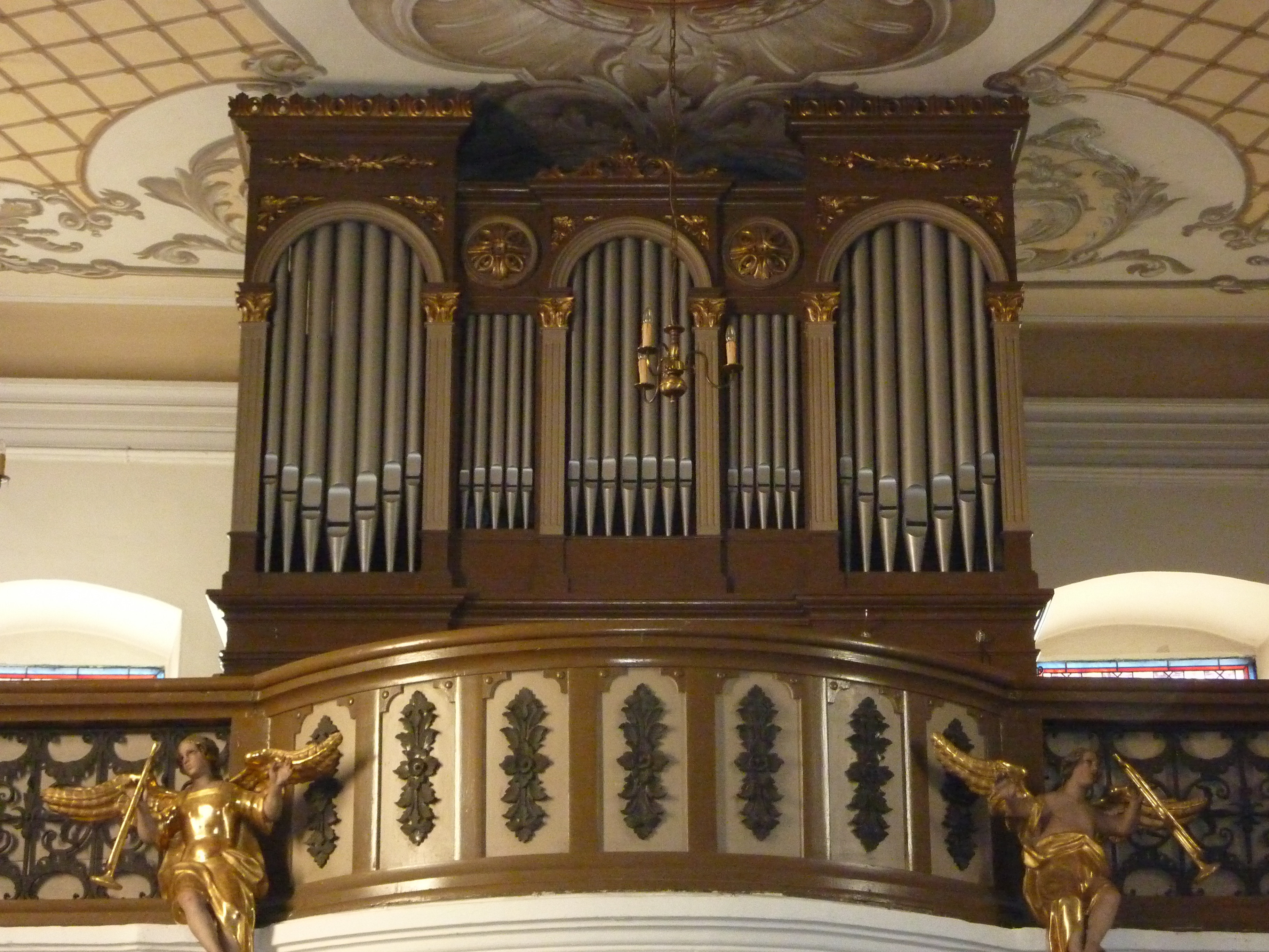 Pfarrkirche hl. Agnes, Schönberg am Kamp, Niederösterreich - Orgel mit Werk von Franz Capek 1902